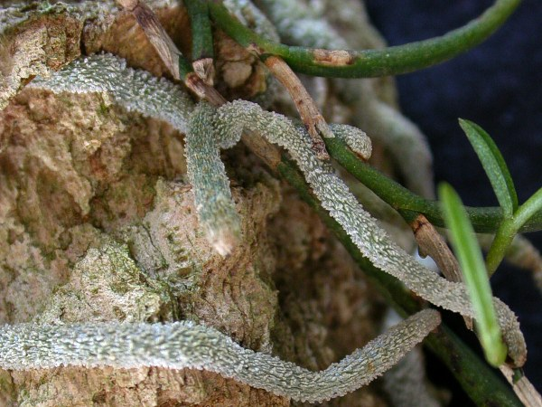 Campylocentrum aciculatum de Minas Gerais